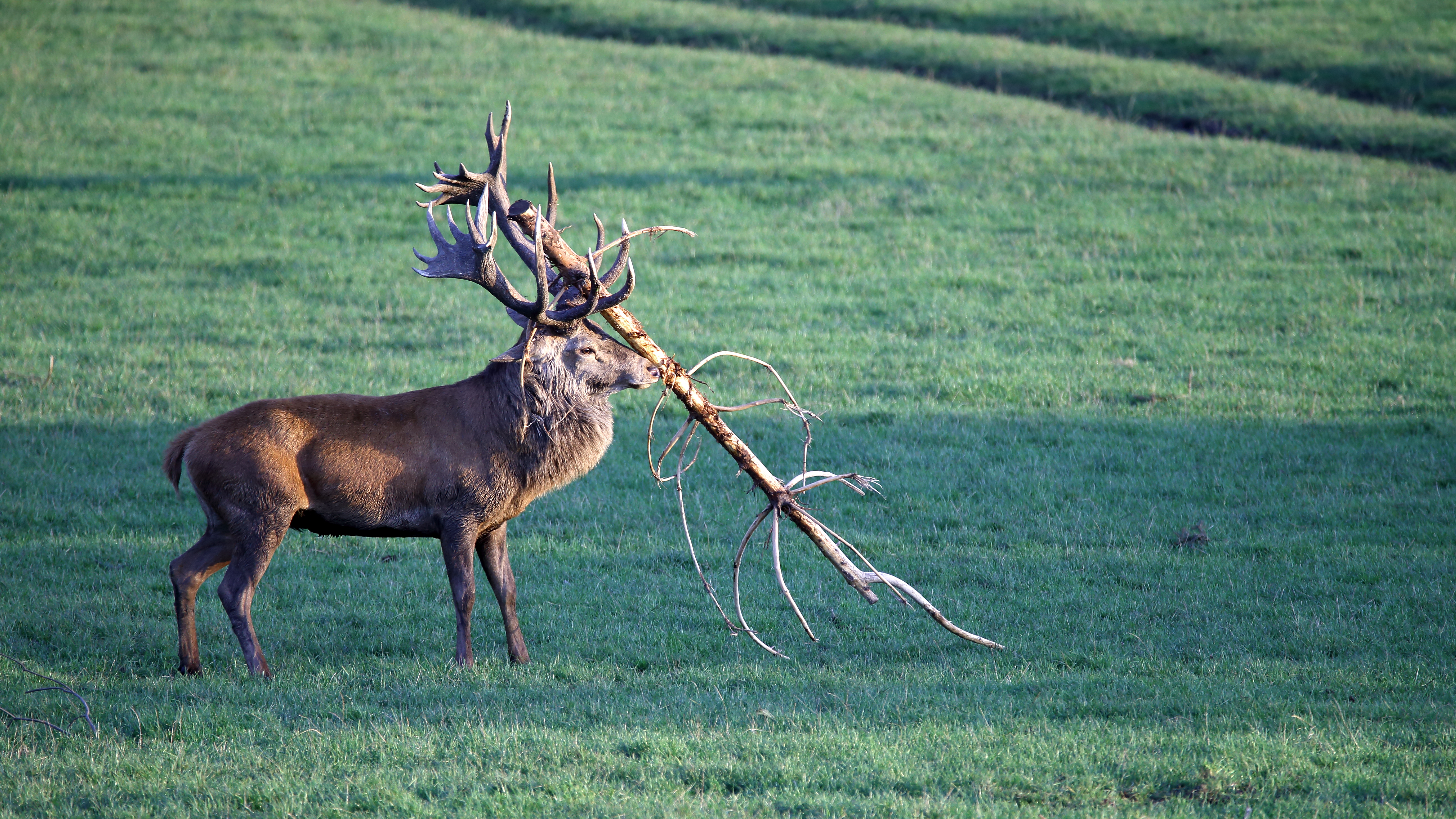 Rothirsch kämpft mit einem Fichtenstamm und markiert mit den Augendrüsen sein Revier.